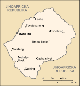 Mapa Lesotha - přeložená mapa z CIA World Factbook.